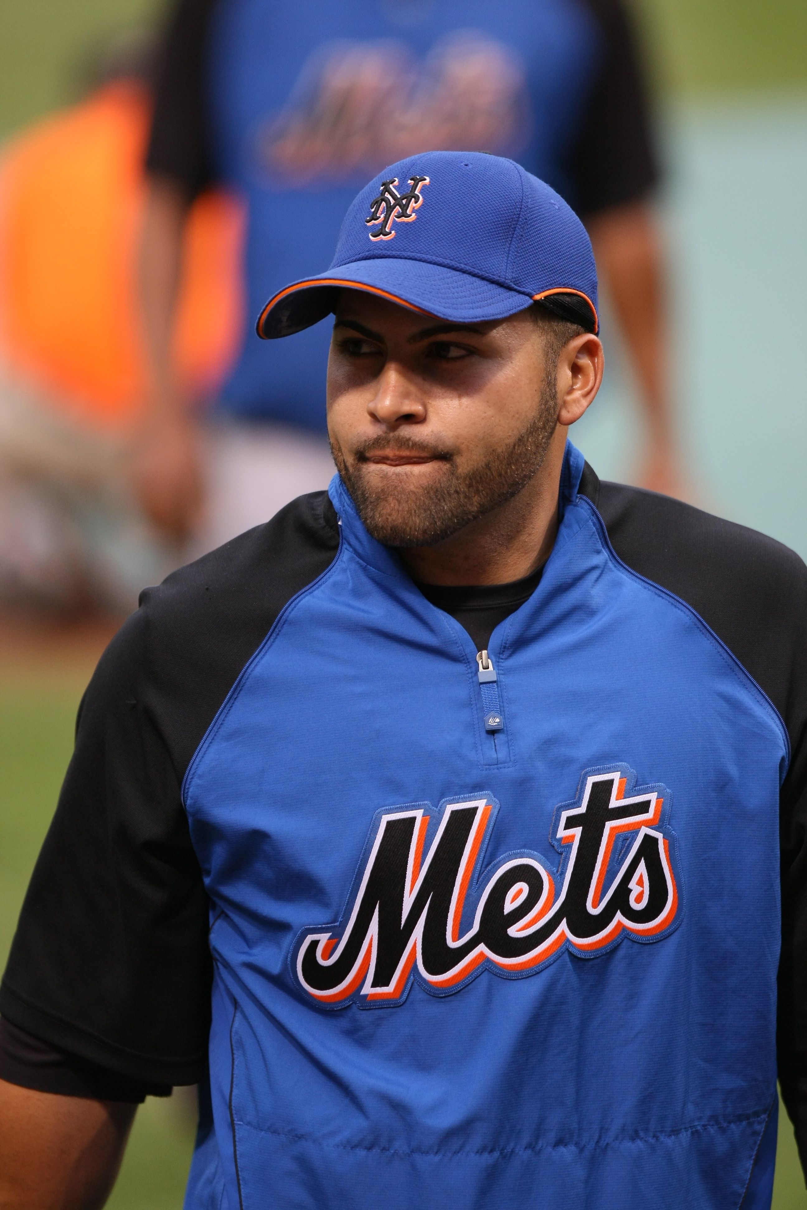 Omir Santos